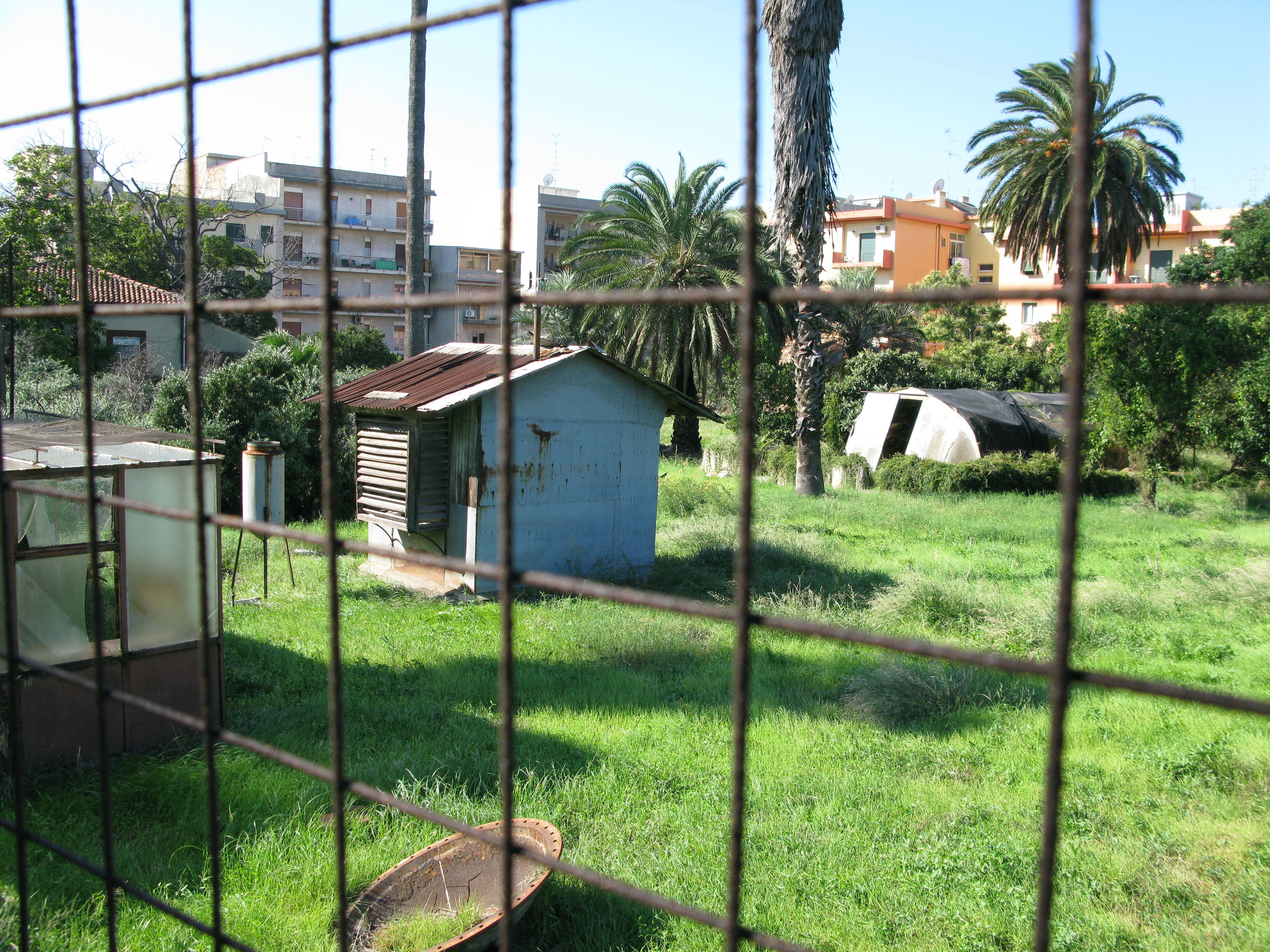 Campo Sperimentale della Stazione Sperimentale per le Industrie delle Essenze e dei Derivati dagli Agrumi (erroneamente chiamato "orto botanico") - Reggio Calabria